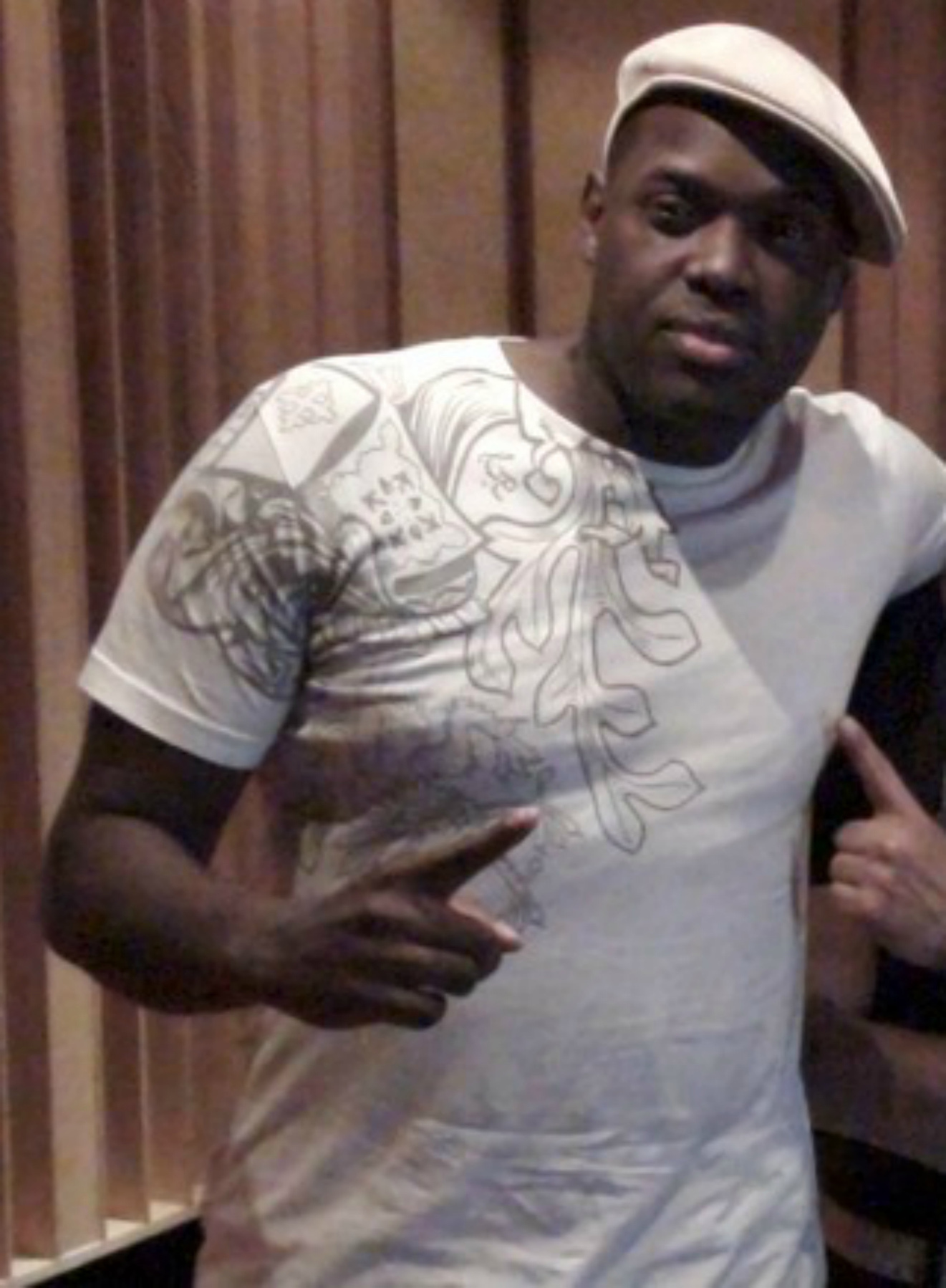 Magic Juan.